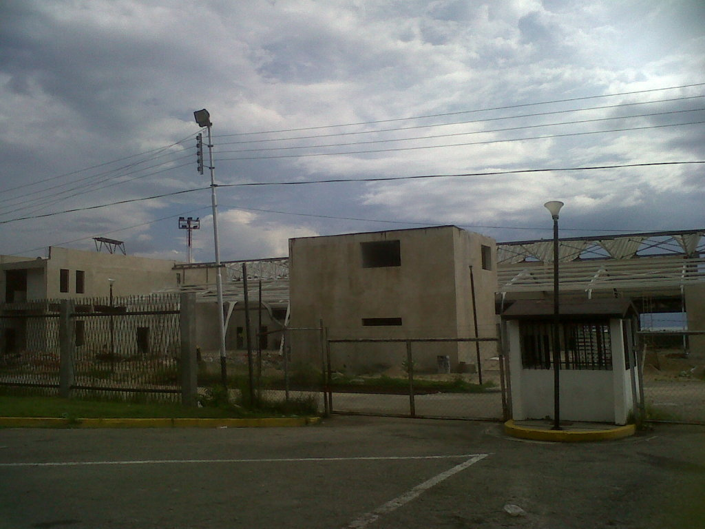 construccion aeropuerto nacional Florencio Gomez